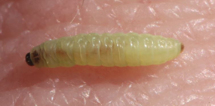 Raupe der Schlehen-Knospenmotte (Argyresthia spinosella), am 28. März 2019 in Walldorf/Baden, Länge: 6 mm, hangelt sich an einem Faden von einer Schlehe herab